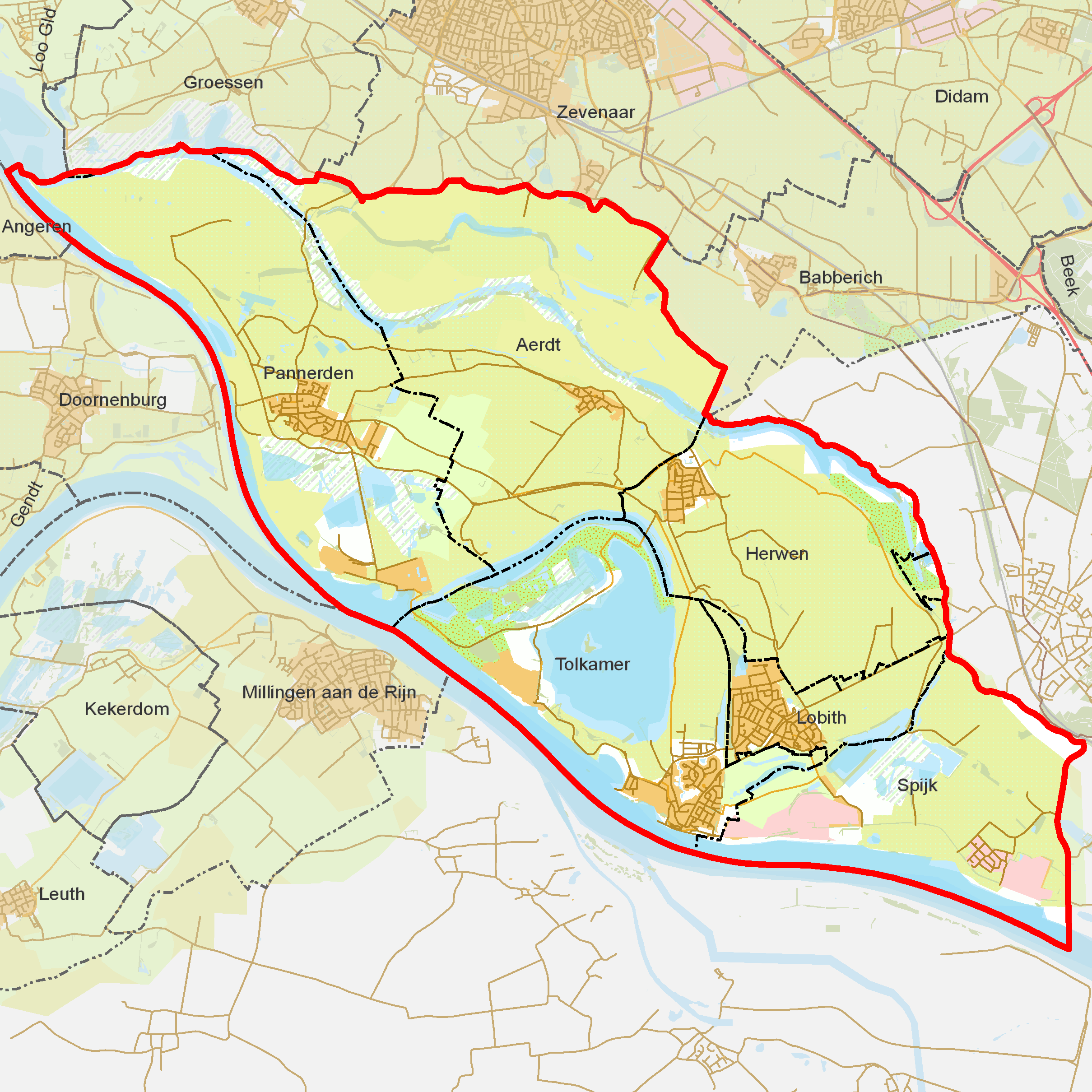 BAG woonplaatsen - Gemeente Rijnwaarden.png